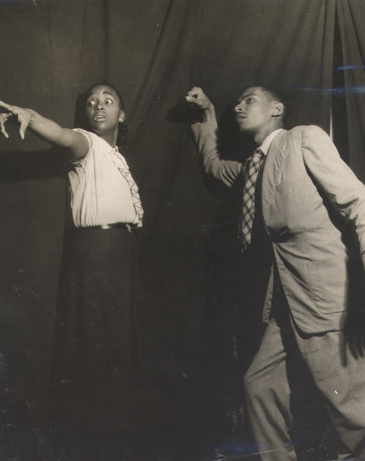 Fotografia do Fundo Correio da Manhã, sob a guarda do Arquivo Nacional.